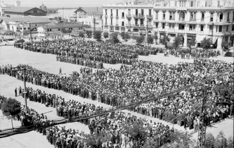 Scherl; Griechenland: In Übereinstimmung zwischen den deutschen und griechischen Stellen werden jetzt die Juden in Griechenland erfasst und einer nutzbringenden Arbeit zugeführt. Kriegsberichter Dick, Juli 1942